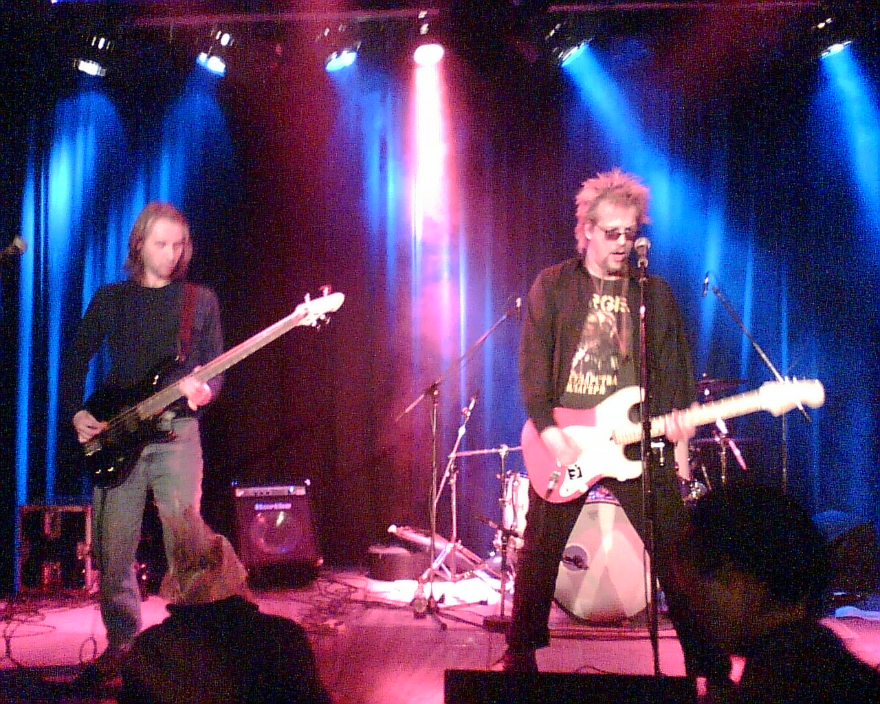 J.M.K.E. in Tikkurila 2006-02-11